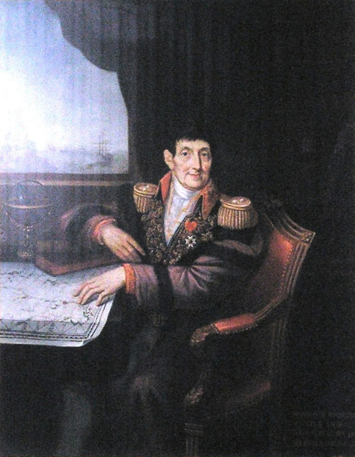 Reproduction photographique du portrait d'Henri Paschal de Rochegude